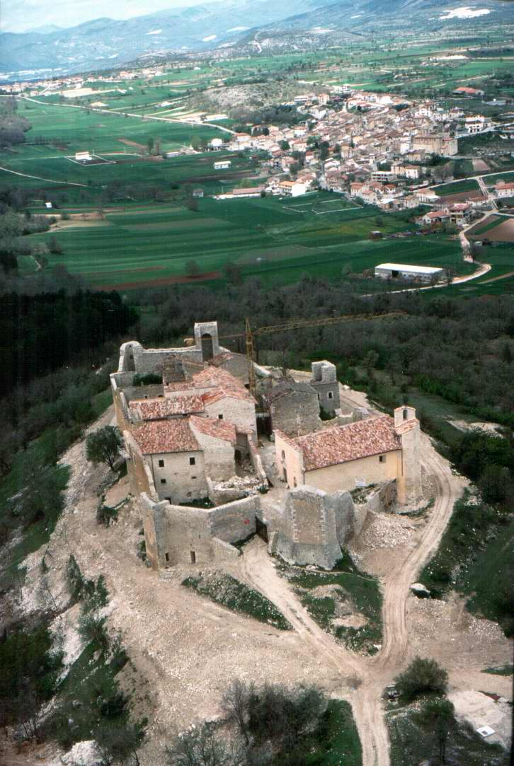 castel camponeschi prata d'ansidonia